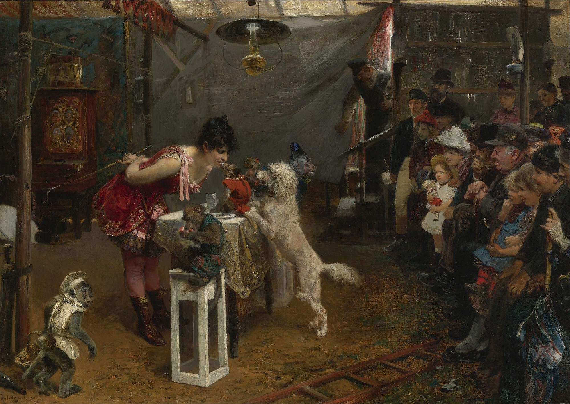 Paul Friedrich Meyerheim: Dressur im Nebenzelt Öl auf Leinwand, 70,2 x 100 cm Privatbesitz